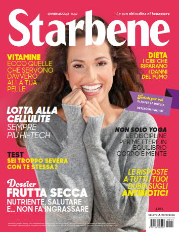 Copertina della rivista Starbene 20 febbraio 2018, Arnoldo Mondadori Editore.